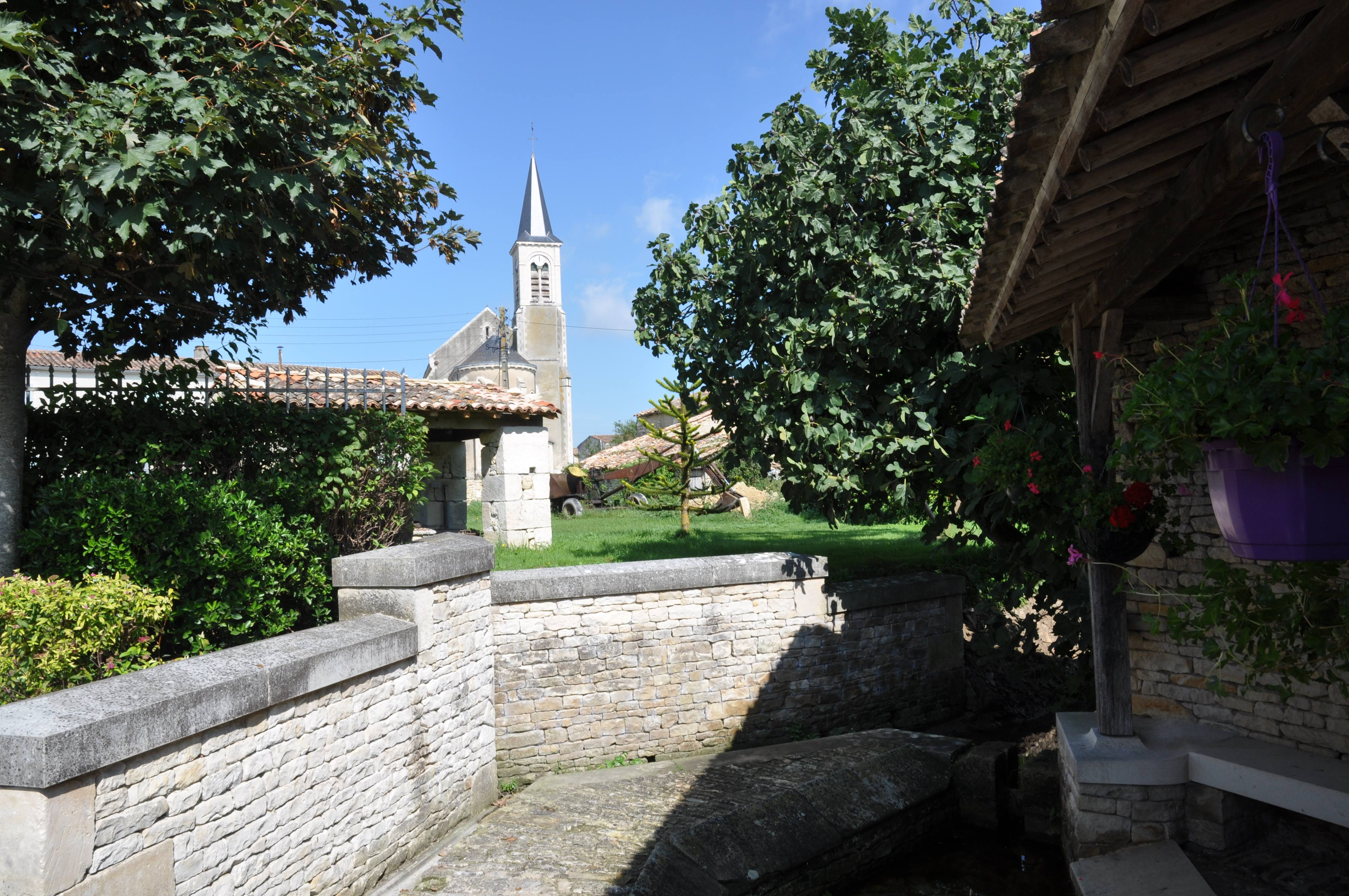 Un lavoir et une église en fond